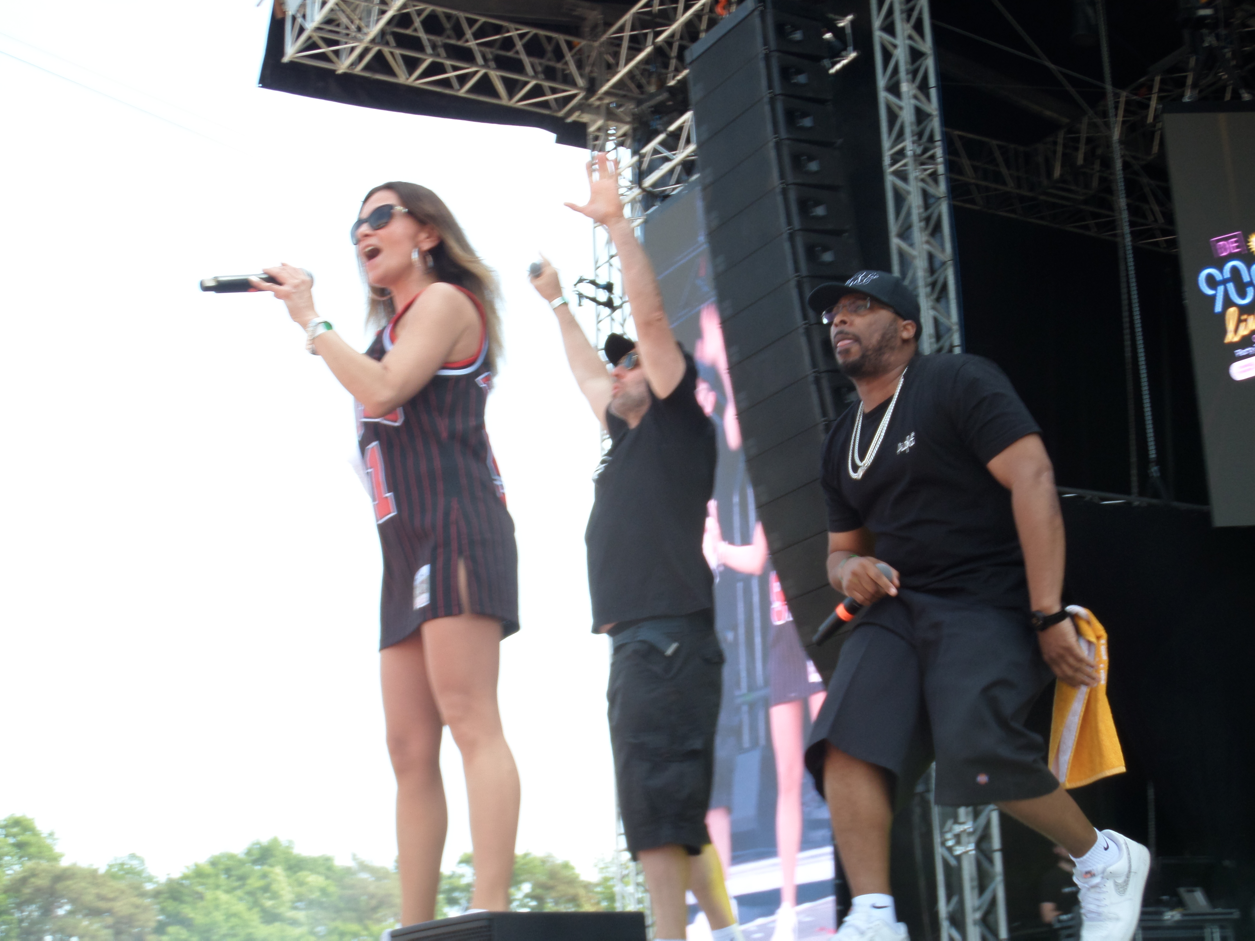 Fun Factory bei 90er Live in Vechta